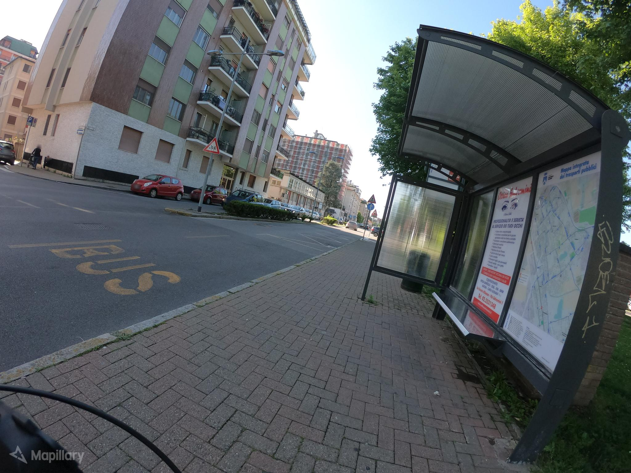 Fermata dell'autobus in via Cesare Battisti a San Donato Milanese